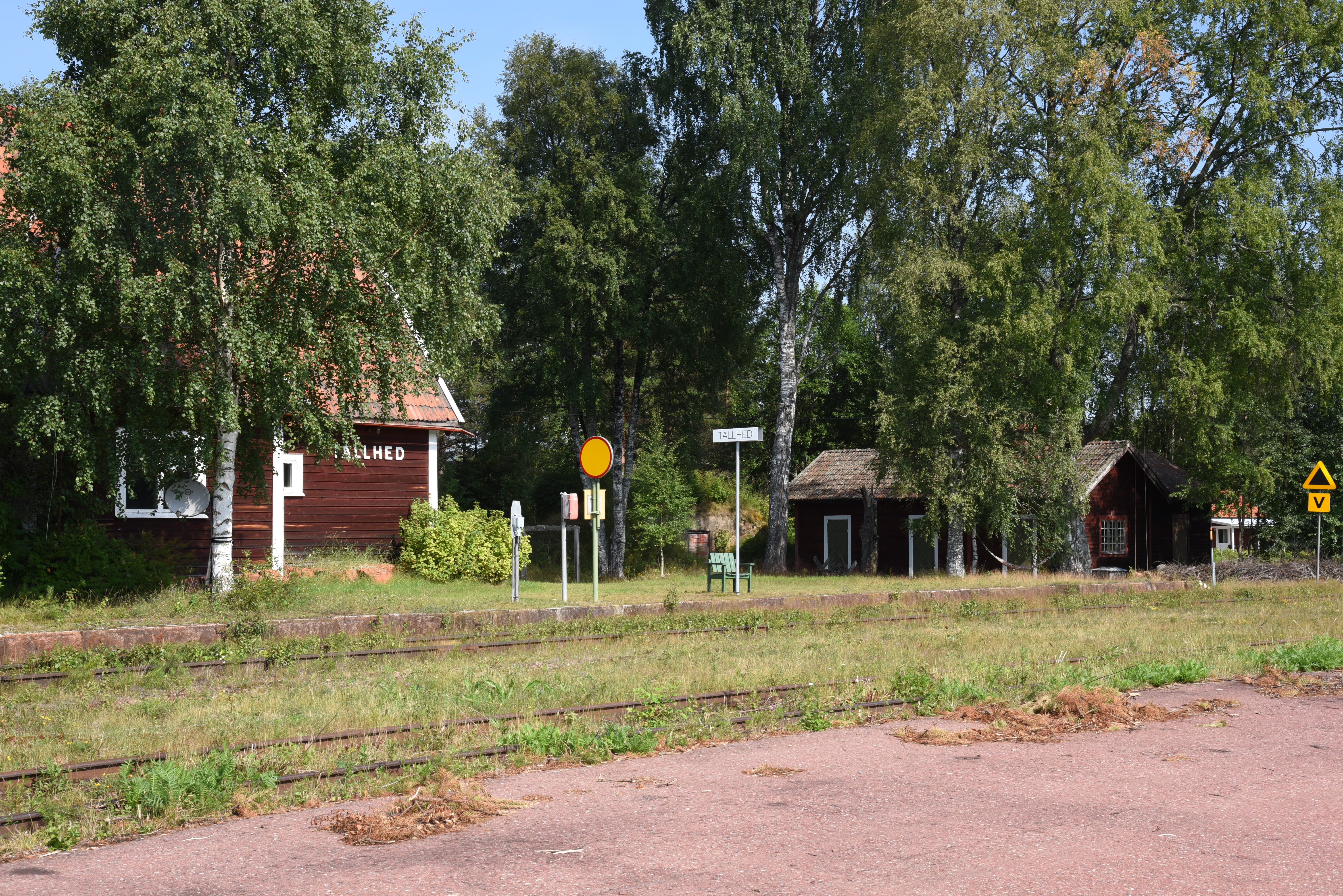 Stationen i byn Tallhed i Orsa kommun, längs Inlandsbanan.